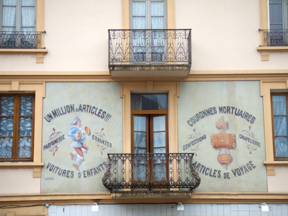 Fresques murales restaurées du bazar du travail des prisons à Pont-de-Beauvoisin (38) - France